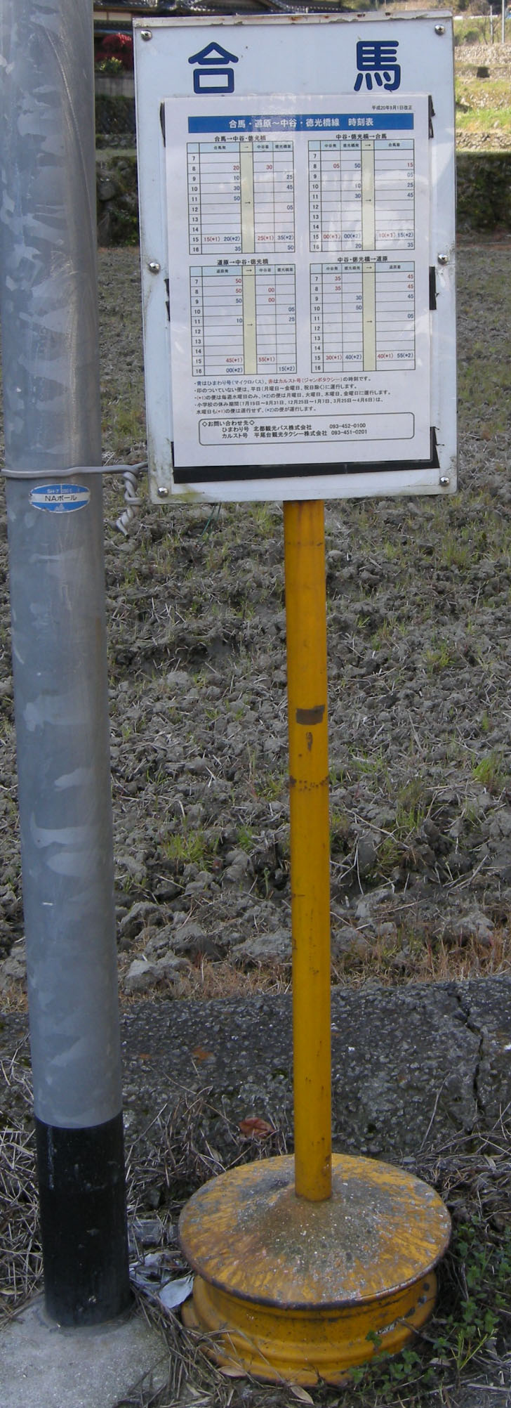 北九州市おでかけ交通 合馬・道原地区の停留所